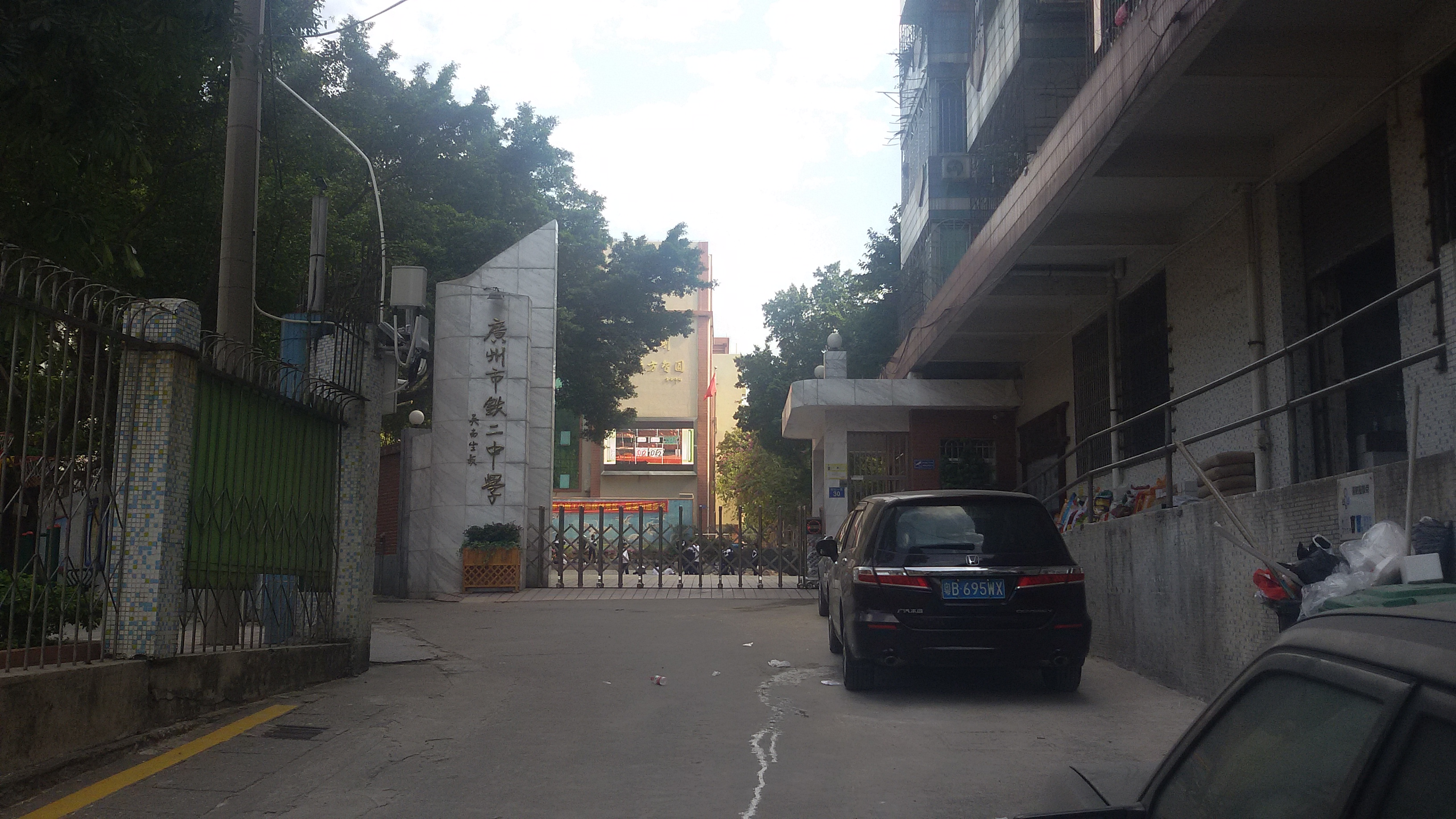 粵語: 廣州市鐵二中學